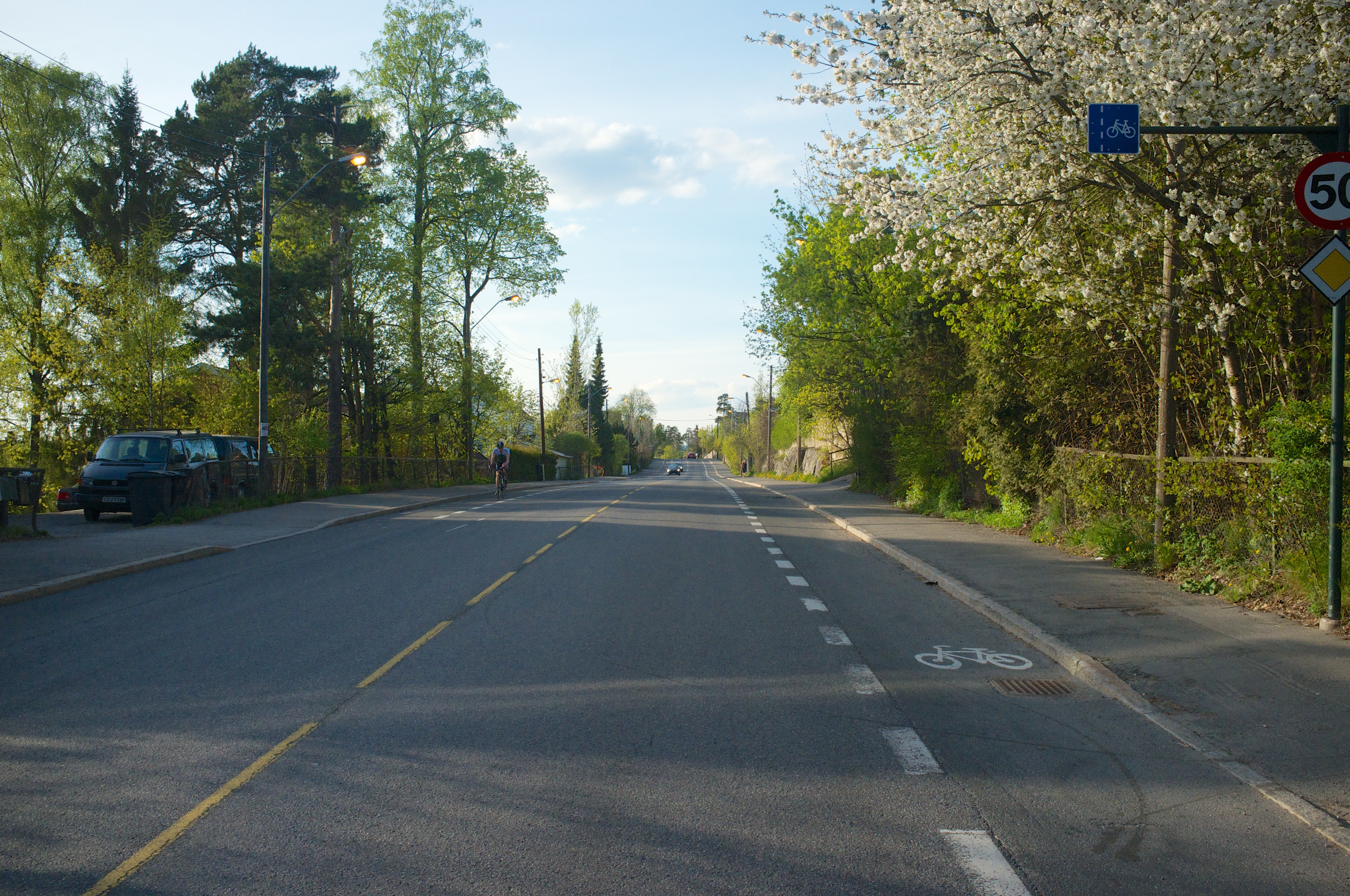 Ekebergveien i Oslo.